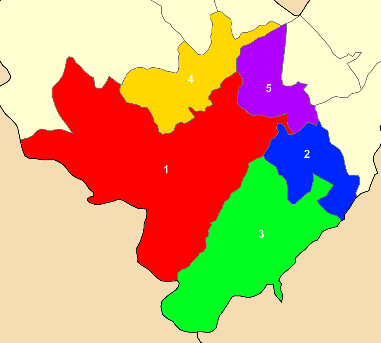 Χάρτης των ενοτήτων (και πρώην δήμων) από τις οποίες αποτελείται ο Δήμος Βέροιας